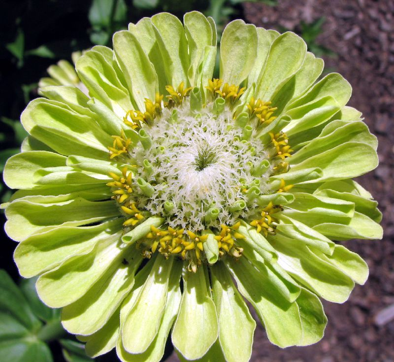 Zinnia